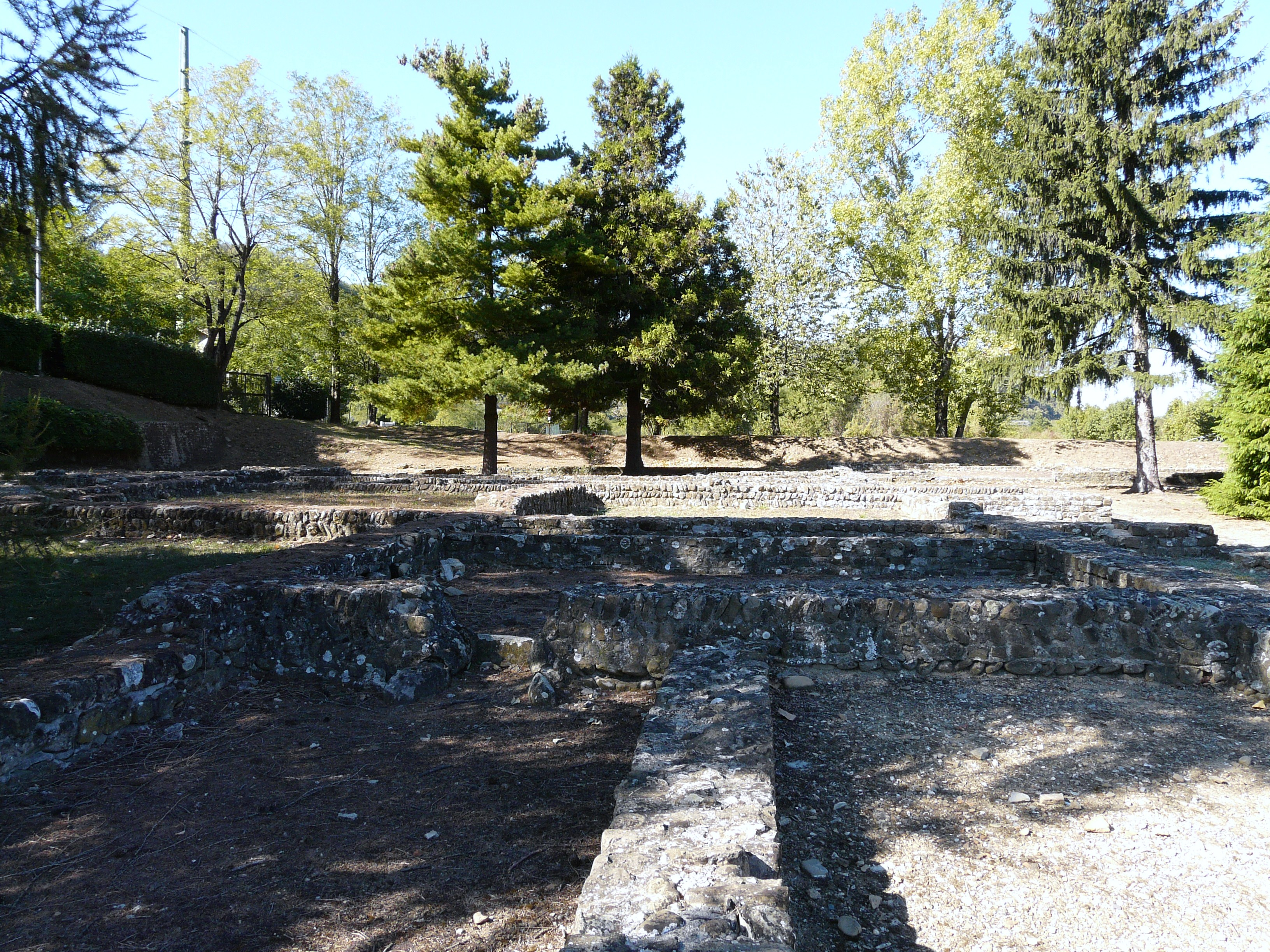 Immagini varie dei ritrovamenti dell'antica città romana di Libarna, oggi frazione di Serravalle Scrivia, Piemonte, Italy